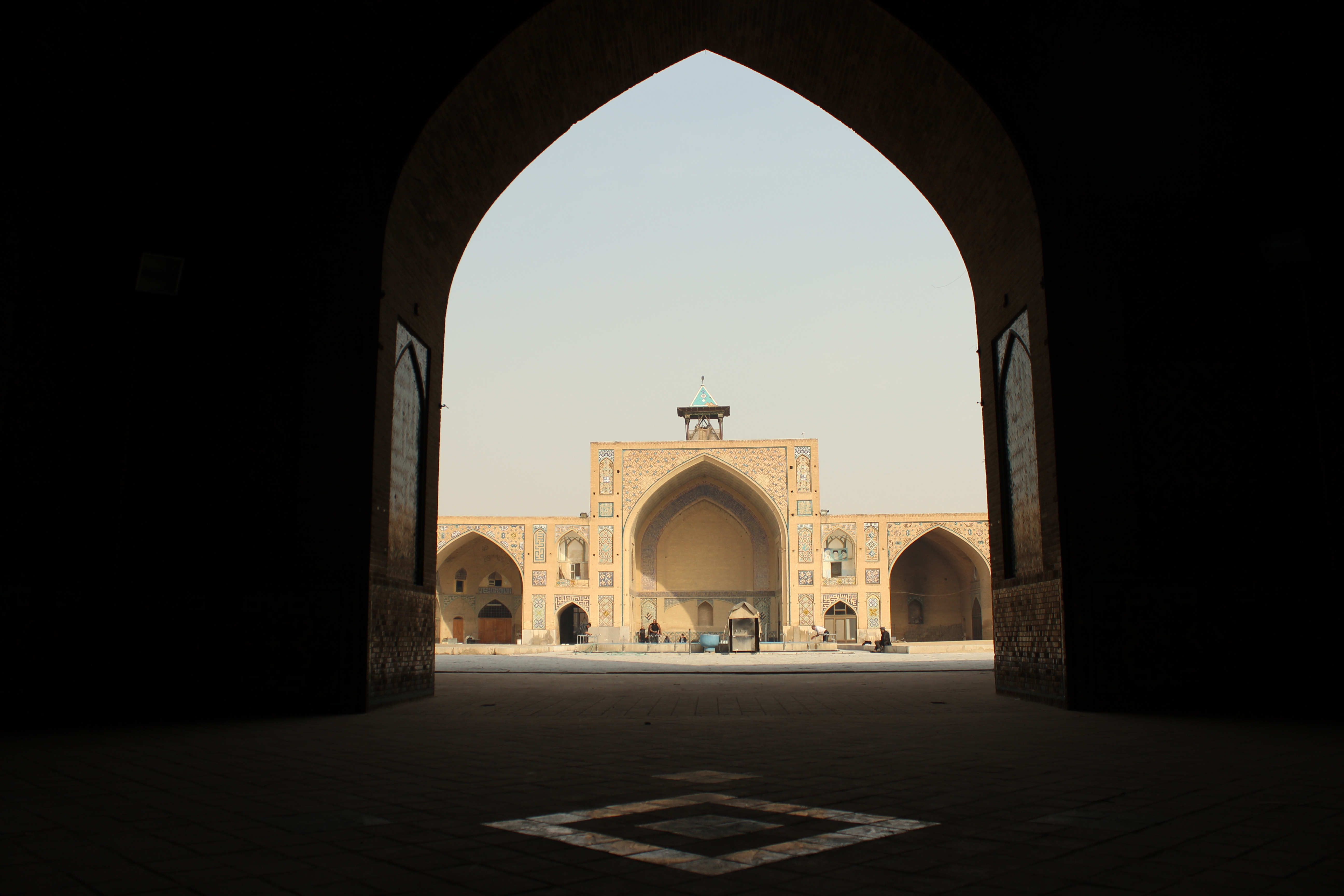 مسجد حکیم